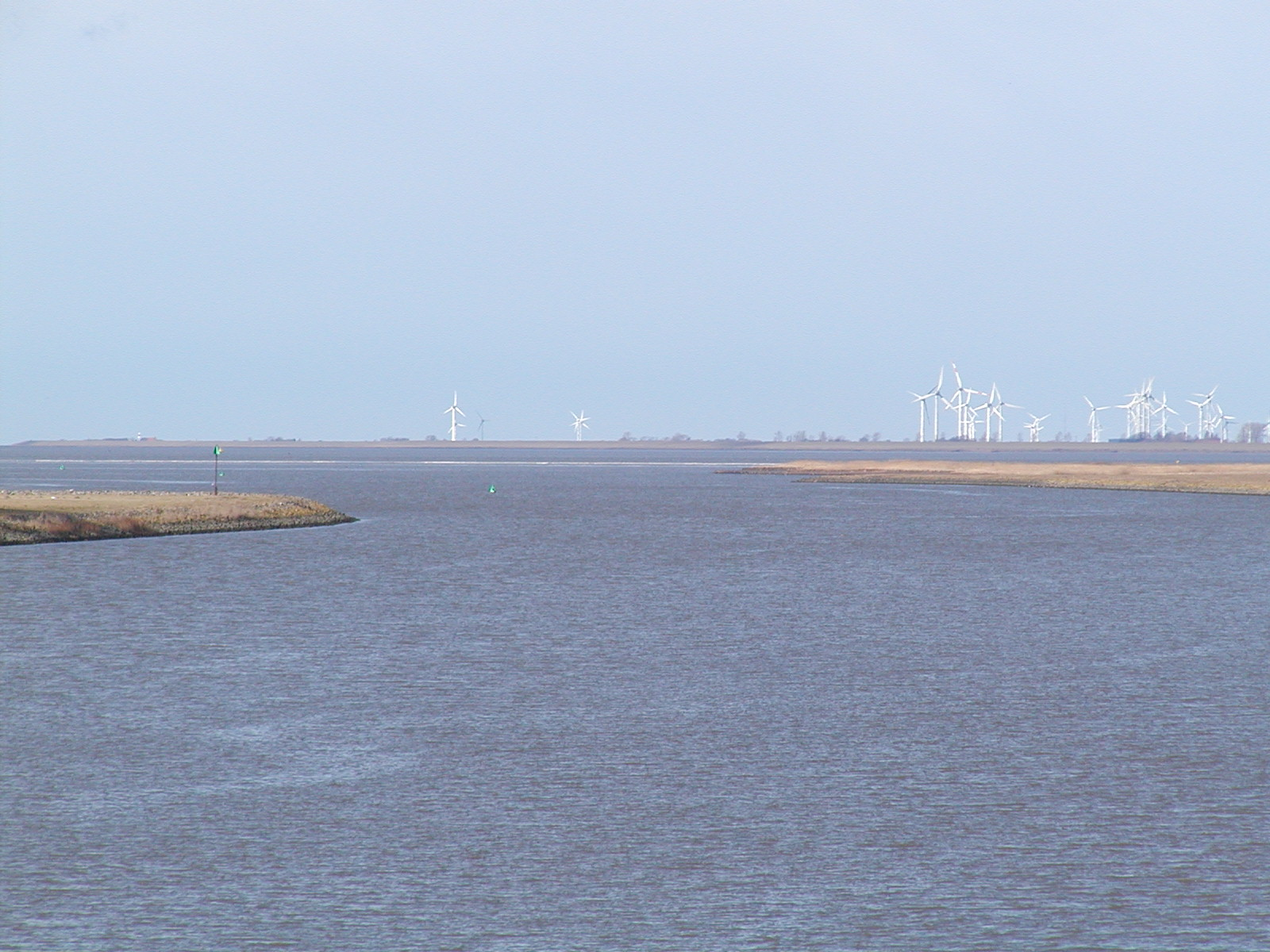 noch ein Bild der Ostemündung